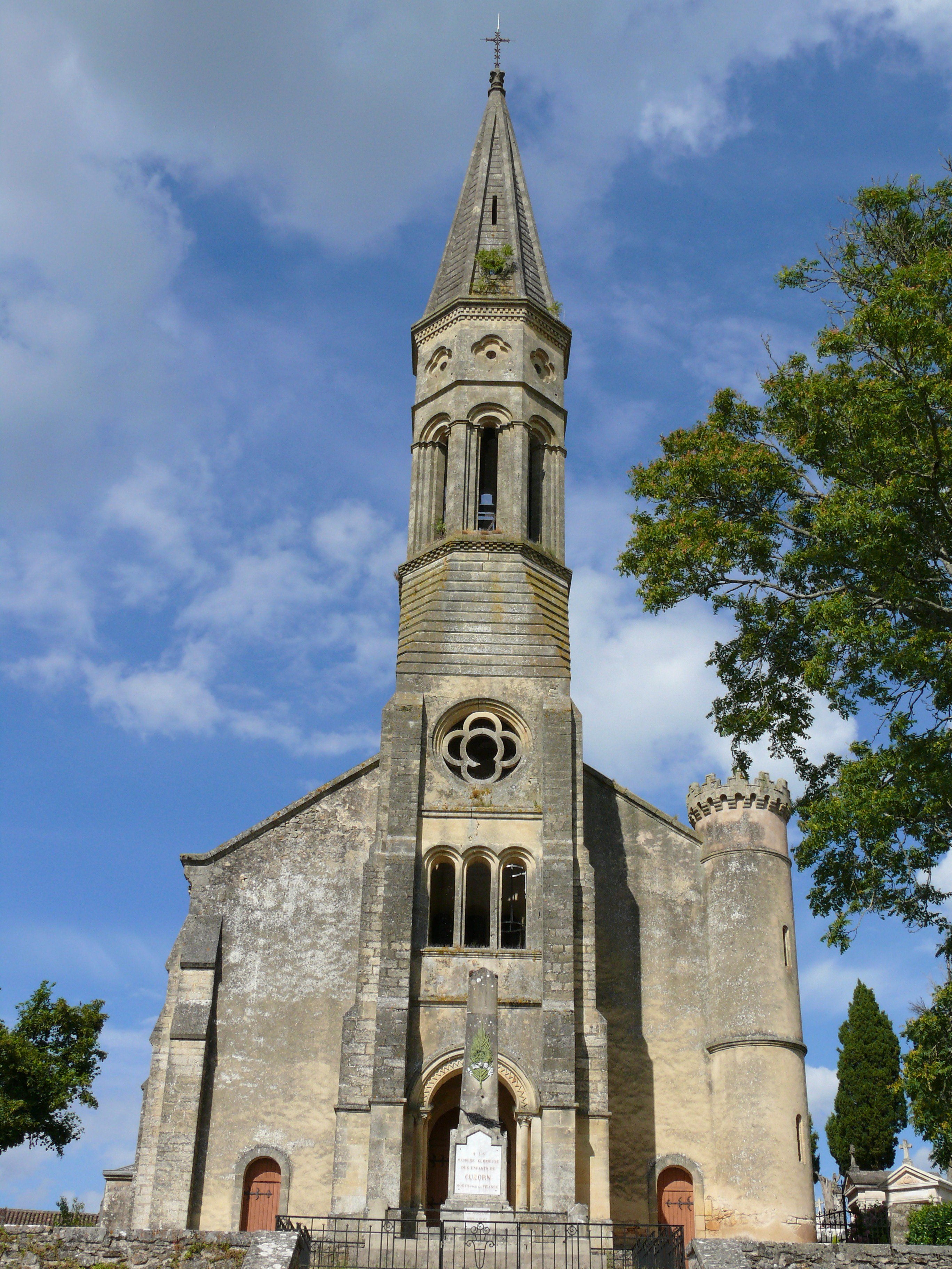 Cuzorn - Eglise Saint-Martin